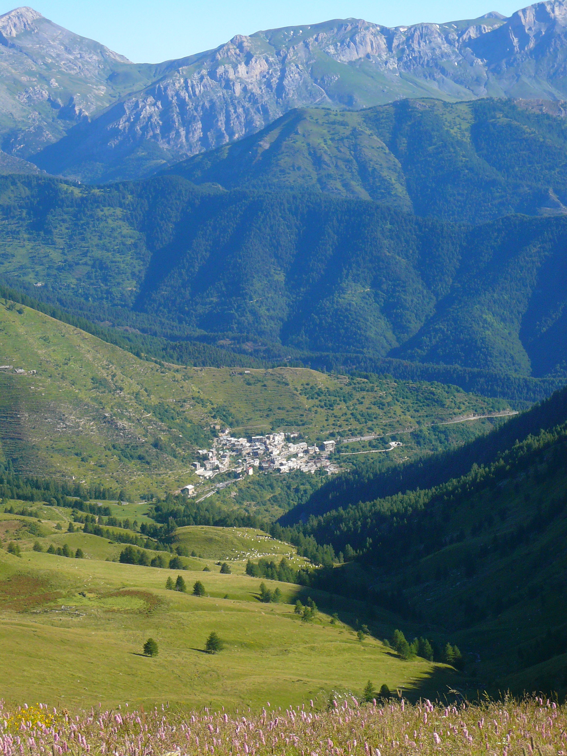 Monesi di Triora village